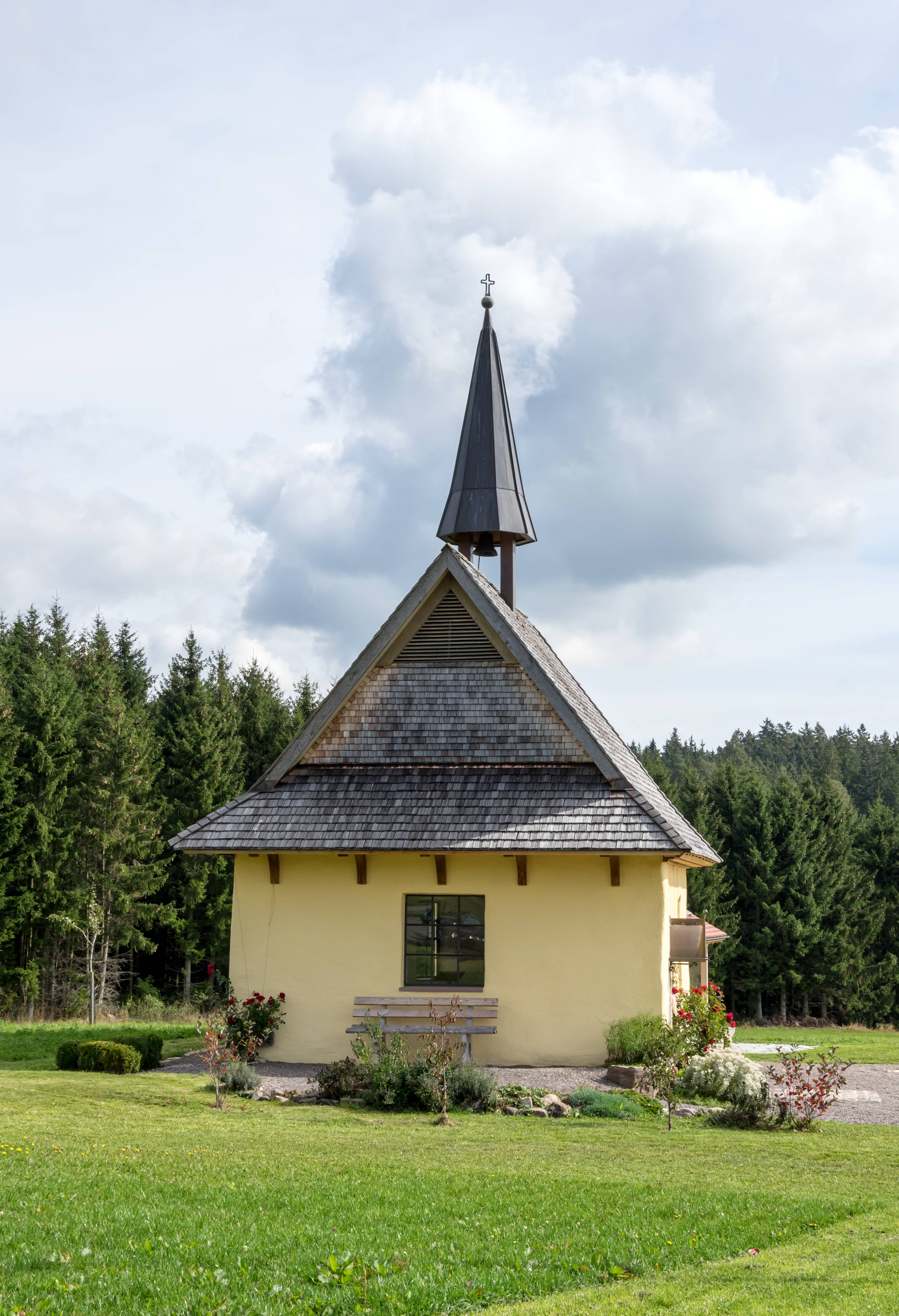 Bilder aus Löffingen Weiler Kapelle von 1440. Die Kapelle ist laut dem Förderverein "Verein zur Erhaltung und Förderung der Kapelle Weiler e. V." ein Baudenkmal